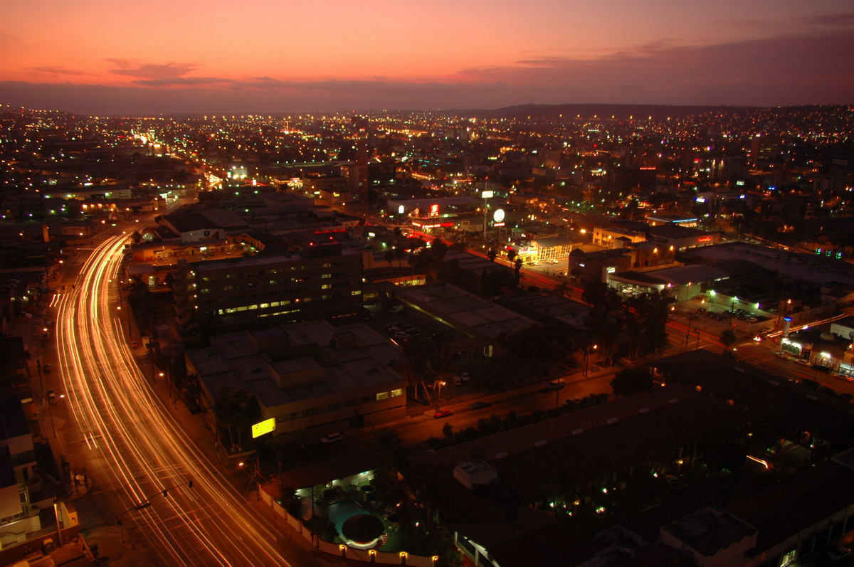 Tijuana, Baja California